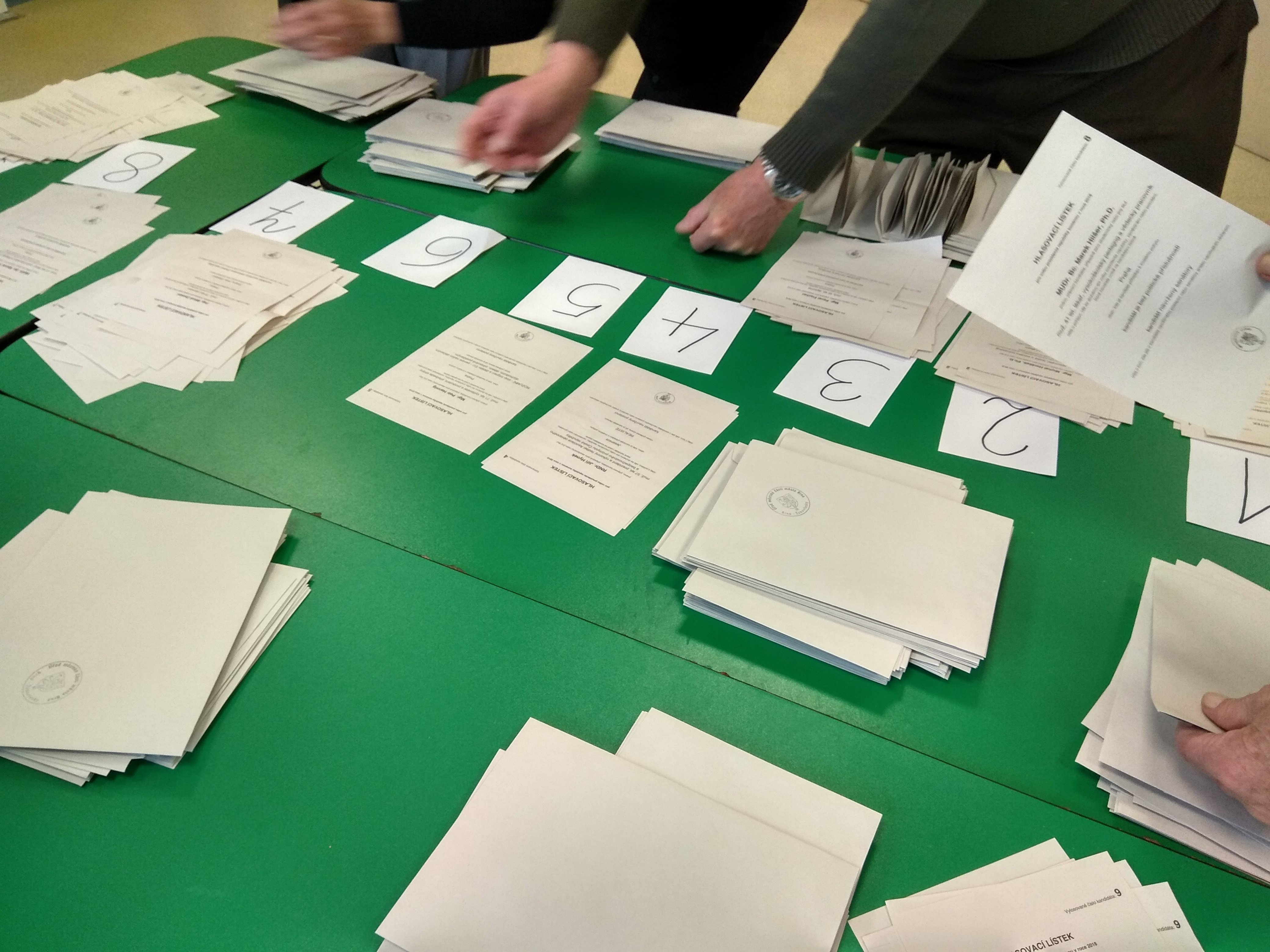 Volba prezidenta České republiky, první kolo, sobota 13. ledna 2018. Volební místnost v Brně, ZŠ náměstí Svornosti. Třídění hlasovacích lístků po vyjmutí z obálek.